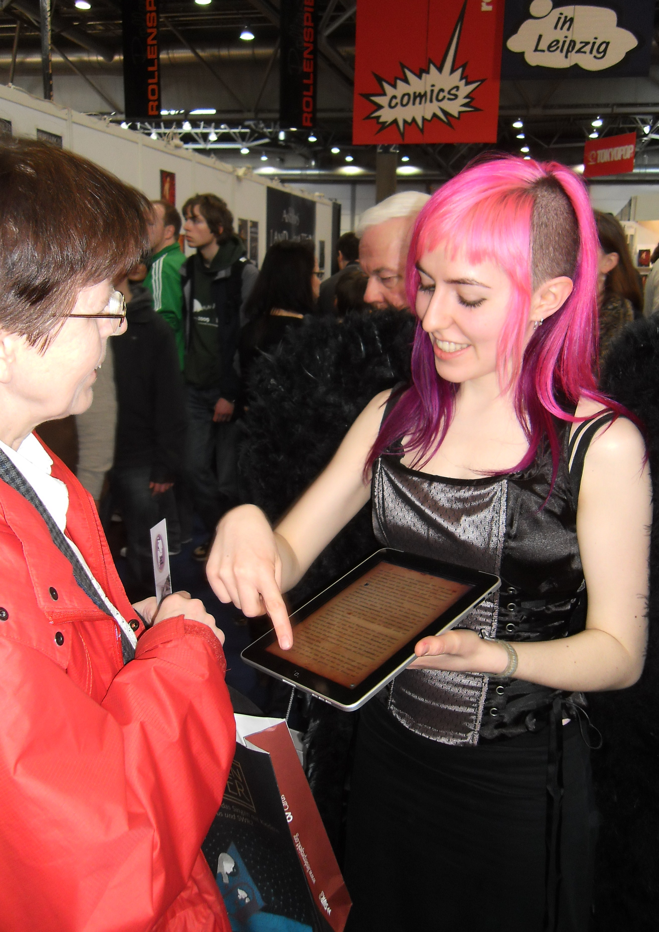 Junge Frau erläutert einer Seniorin das E-Book